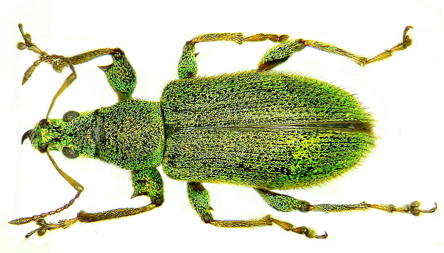 Familie: Curculionidae Grösse: 6-8 mm Verbreitung: Europa Ökologie: auf Laubhölzern Fundort: Germania, Oberfranken, Selbitz leg.det. U.Schmidt, 1971 Foto: U.Schmidt, 2006